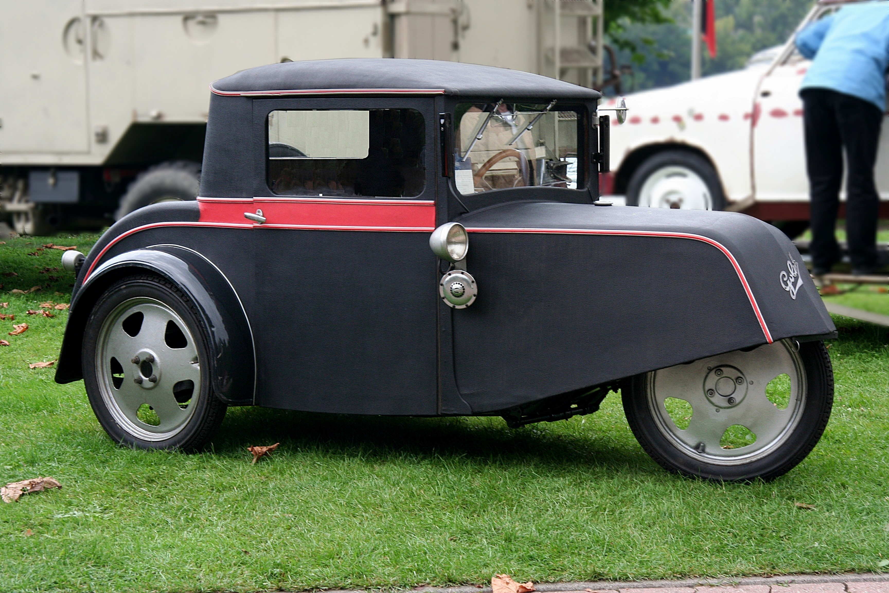 Goliath Pionier (Dreirad-Pkw, Bauzeit 1931 bis 1934), 1-Zyl.-Zweitaktmotor von ILO, 200 und 250 cm³, 5,5 bzw. 6,7 PS bei 3200/min